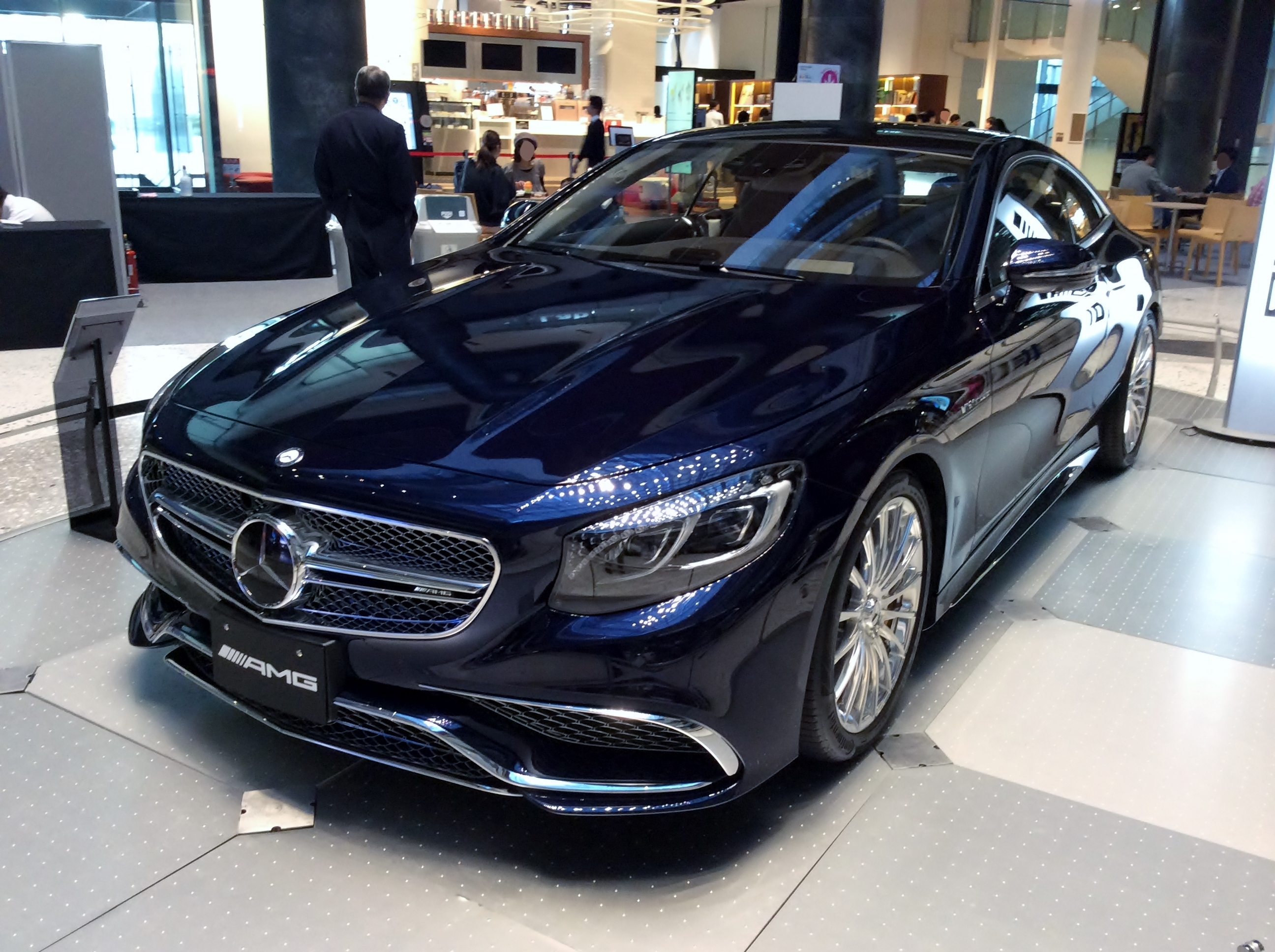 C217型メルセデス・ベンツS65 AMG クーペをフロントから撮影。